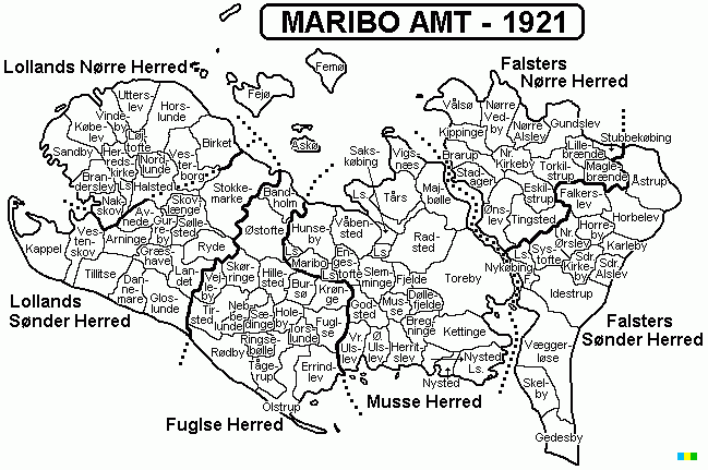 Maribo Amt , Denmark. Map by Svend-Erik Christiansen, edited by user:Nico-dk .